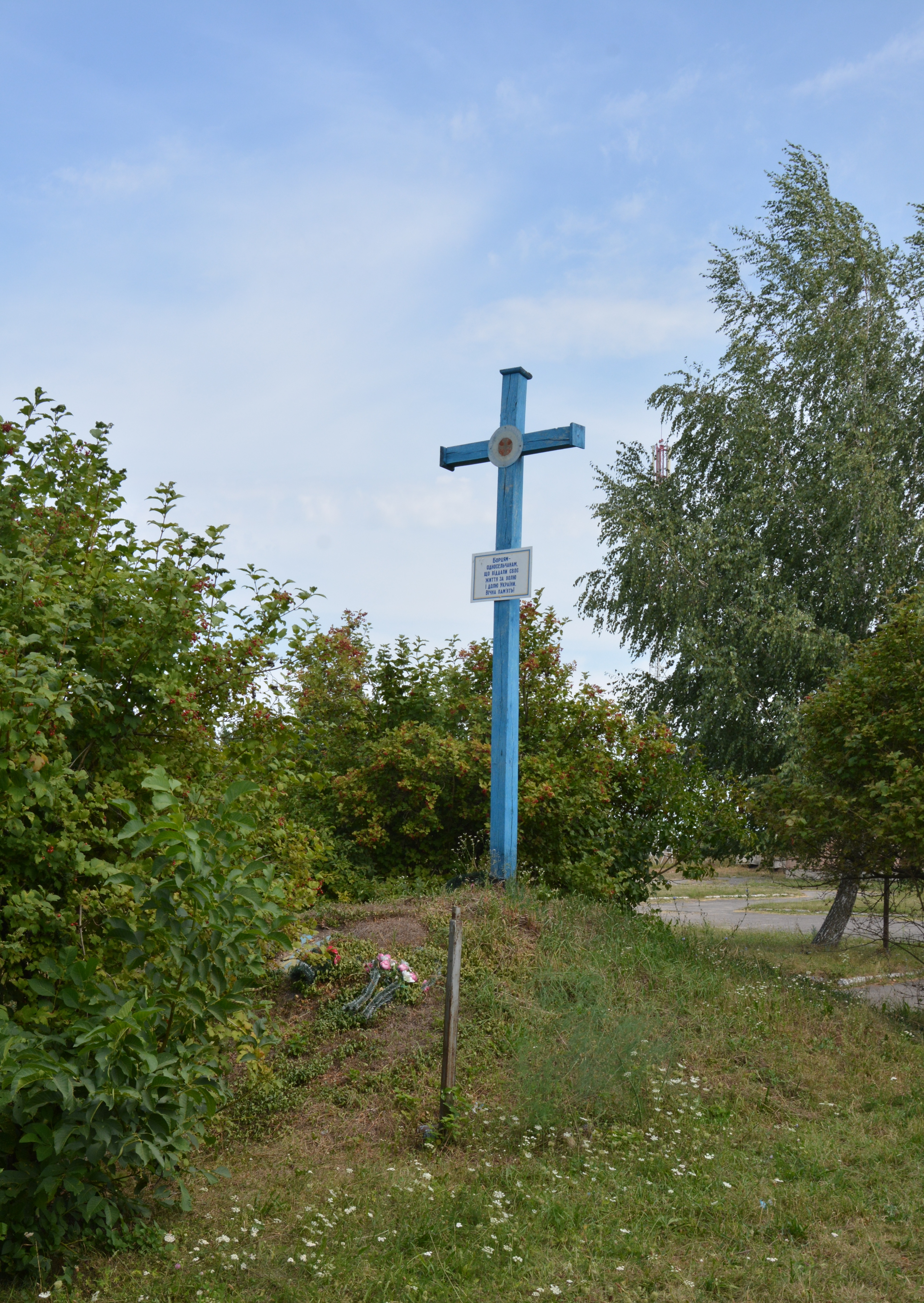 Пам’ятник землякам, Копачівка